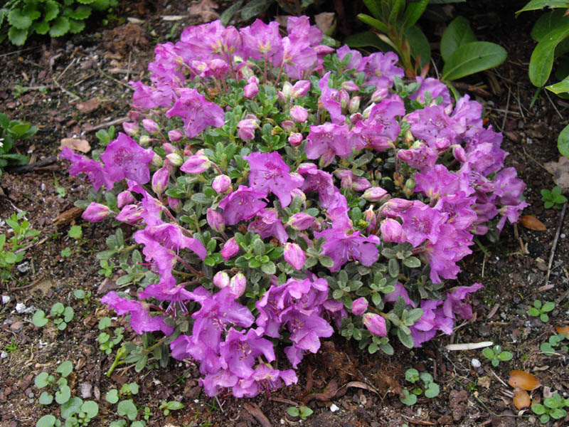 Rhododendron calostrotum subsp. keleticum